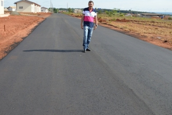 Prefeito Waldeli entrega Costa Rica 100% asfaltada